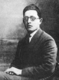 he:אליעזר דן סלונים מראשי היישוב היהודי בחברון ומהרוגי he:מאורעות תרפ"ט